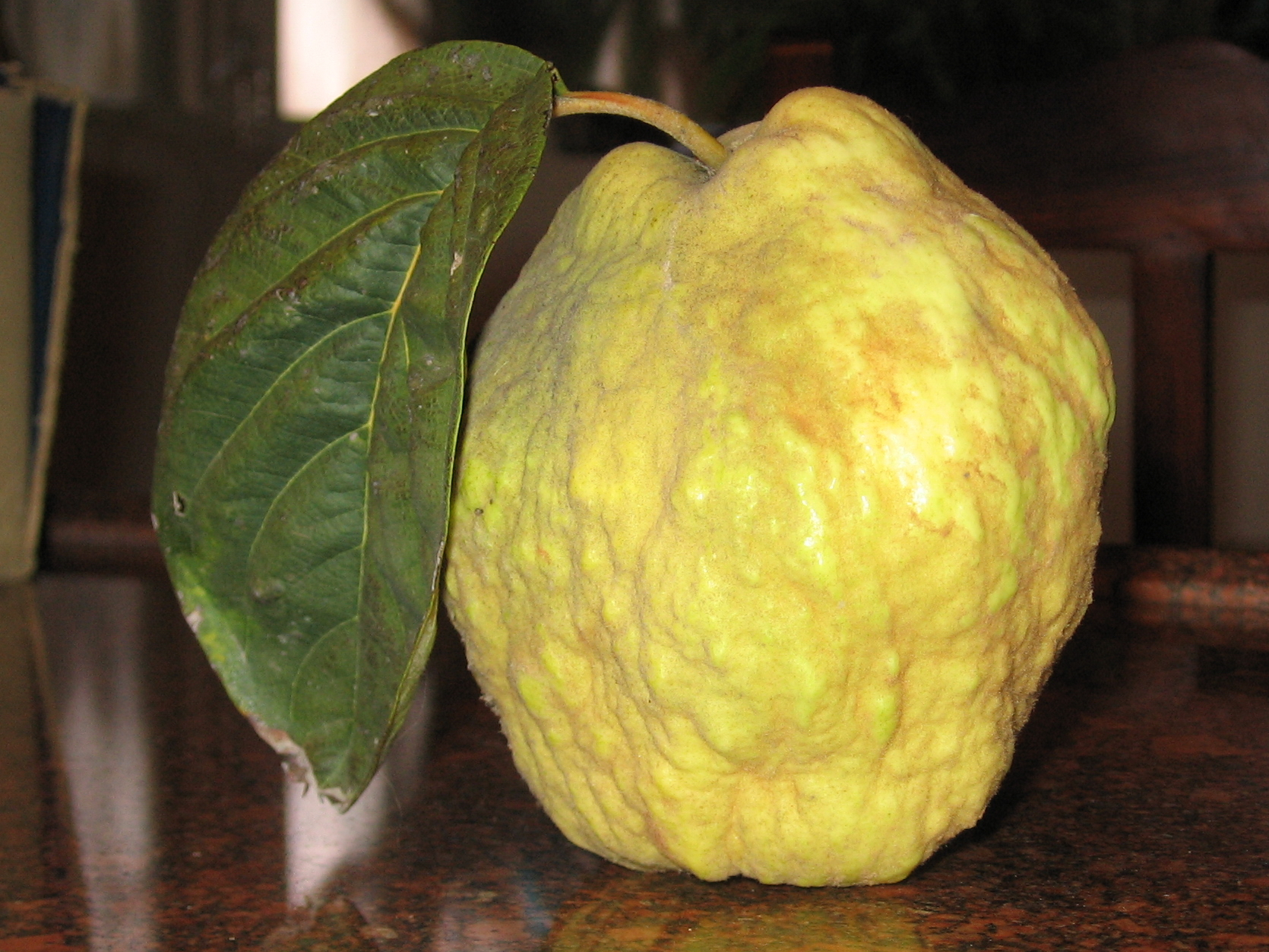 Quince (Cydonia oblonga). A ripe fruit from Israel